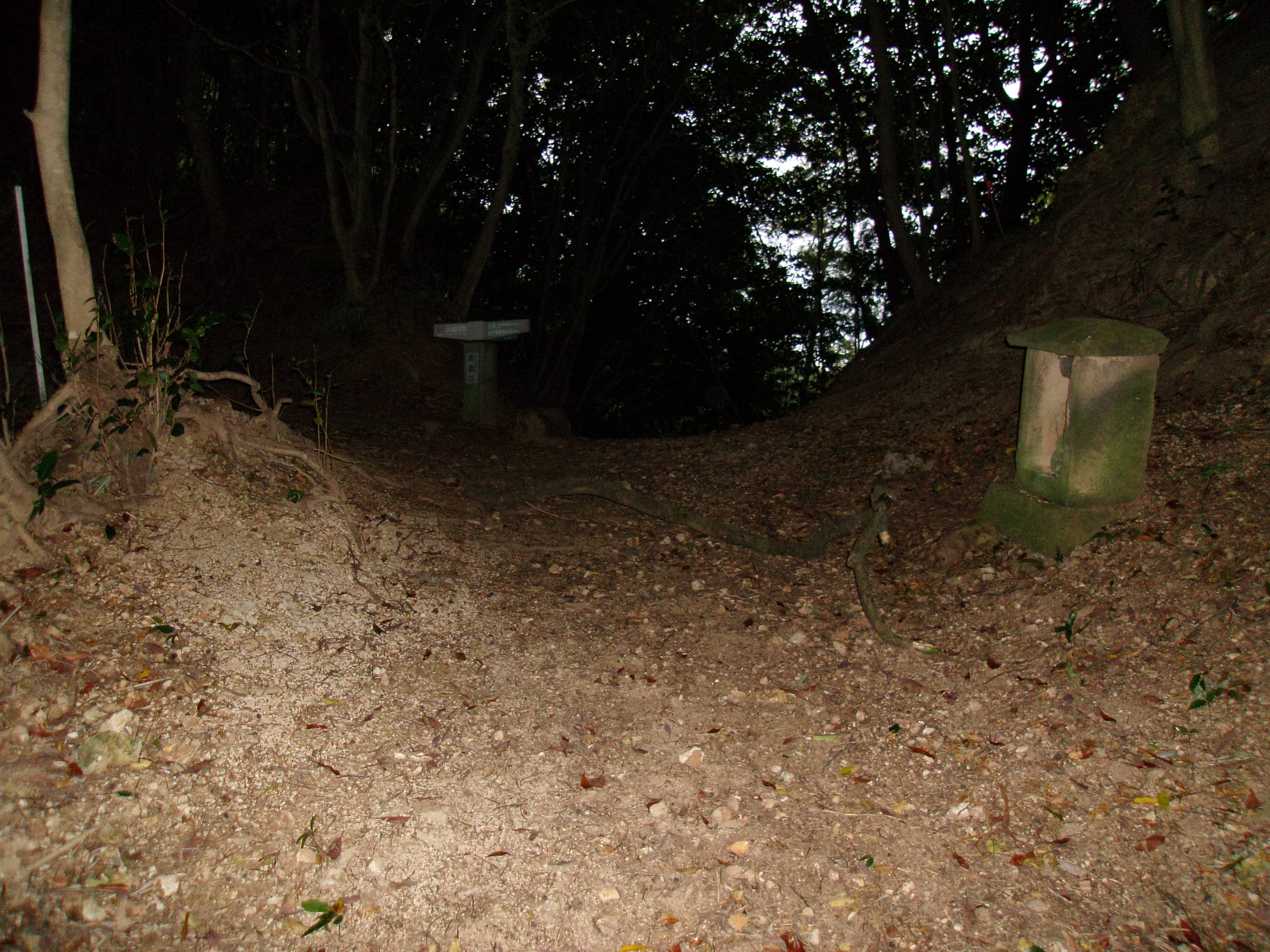 世界遺産「石見銀山」の構成資産である銀山街道鞆ヶ浦道 吉迫口番所跡（牛の首）